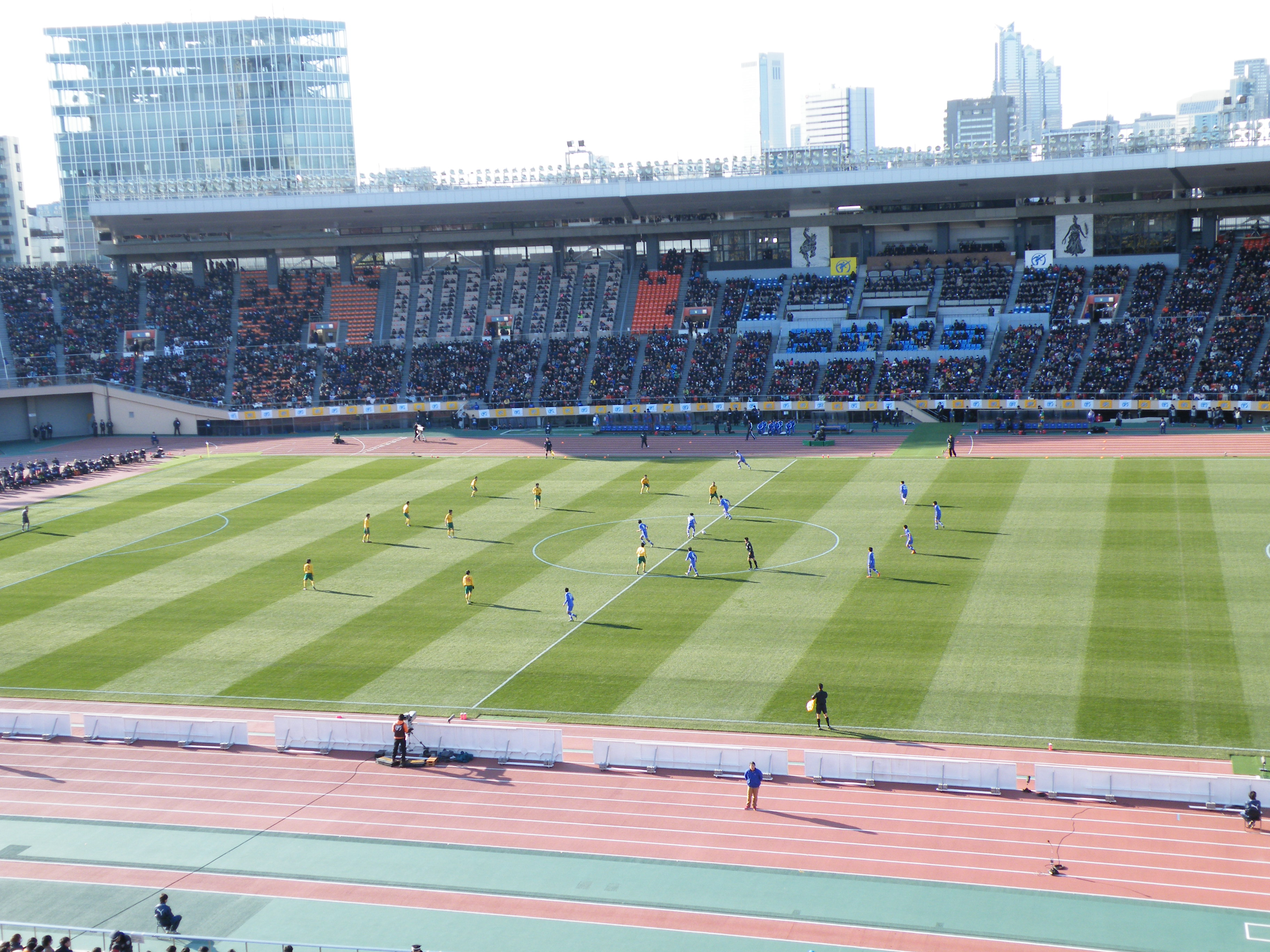 第92回全国高等学校サッカー選手権大会決勝戦の様子